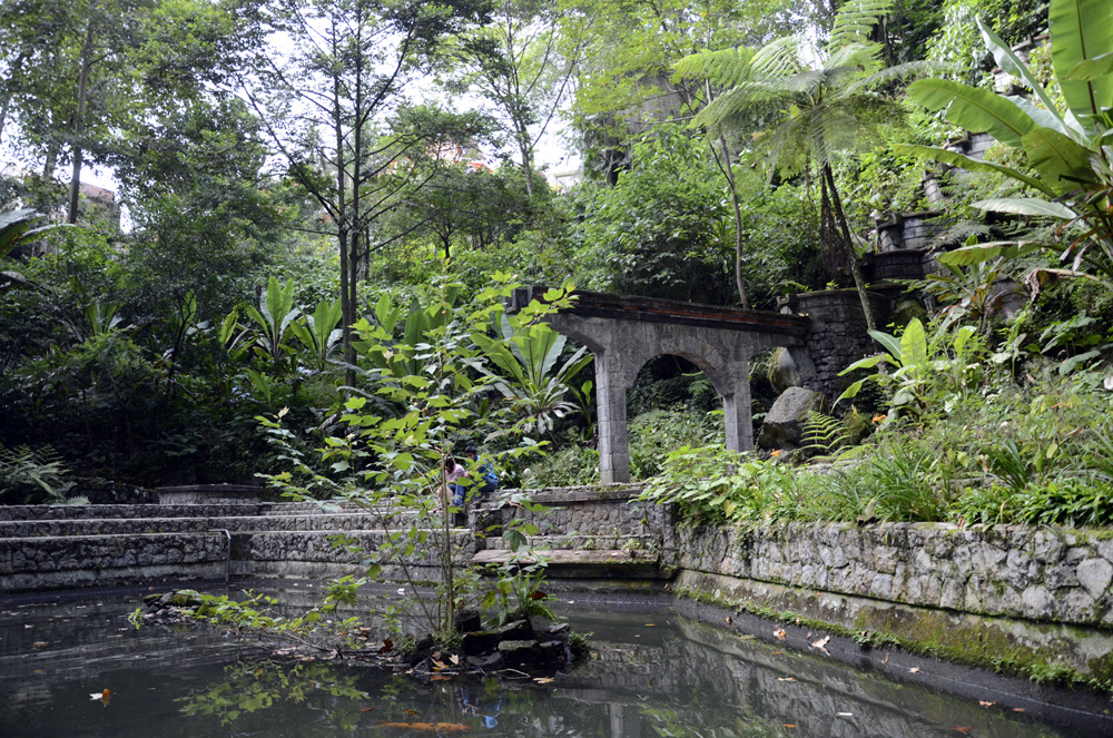 Vista del parque "Los Tecajetes" en Xalapa, Veracruz, México.